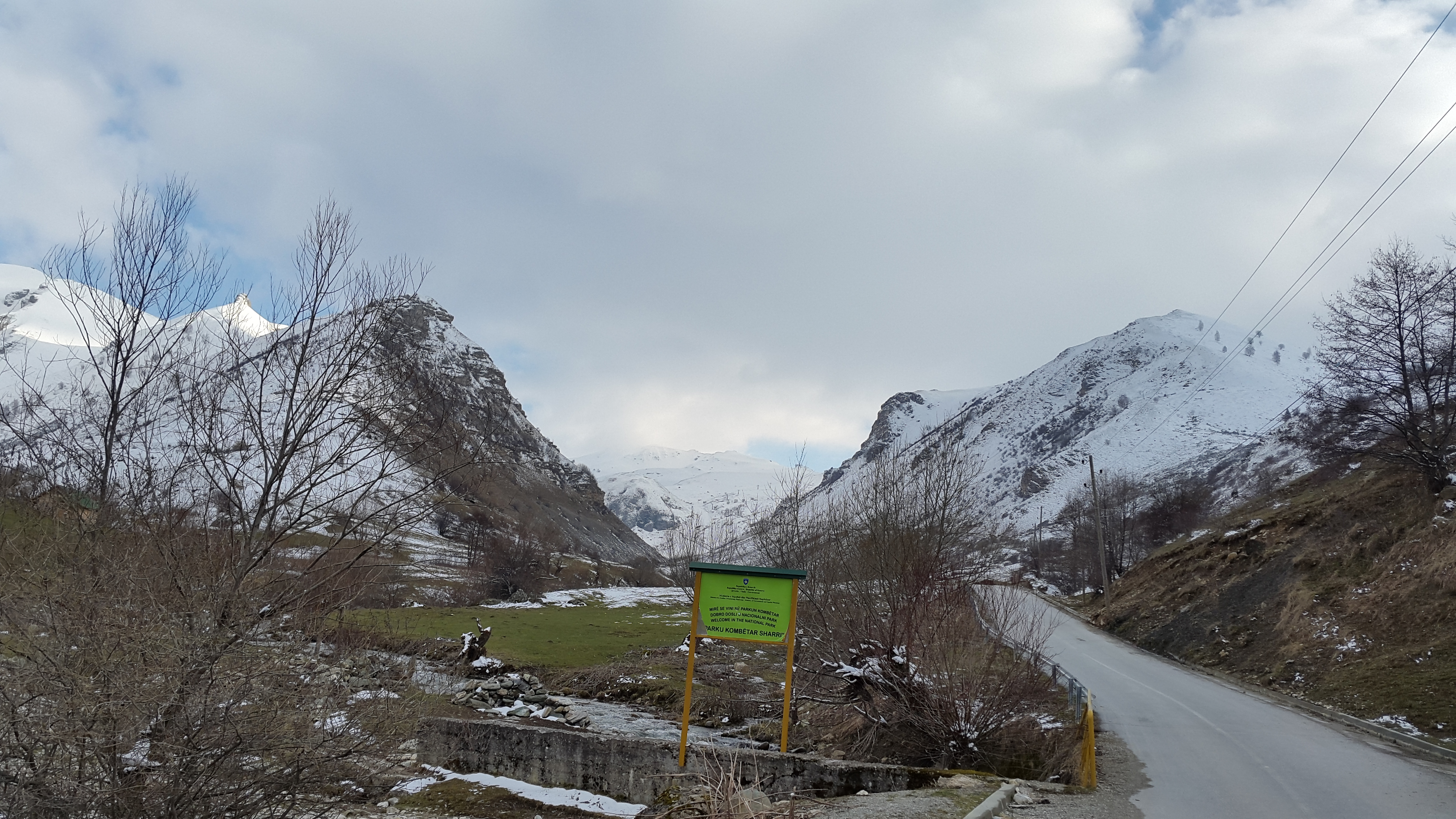 Pamje nga Parku Kombëtar i Sharrit në Kososvë